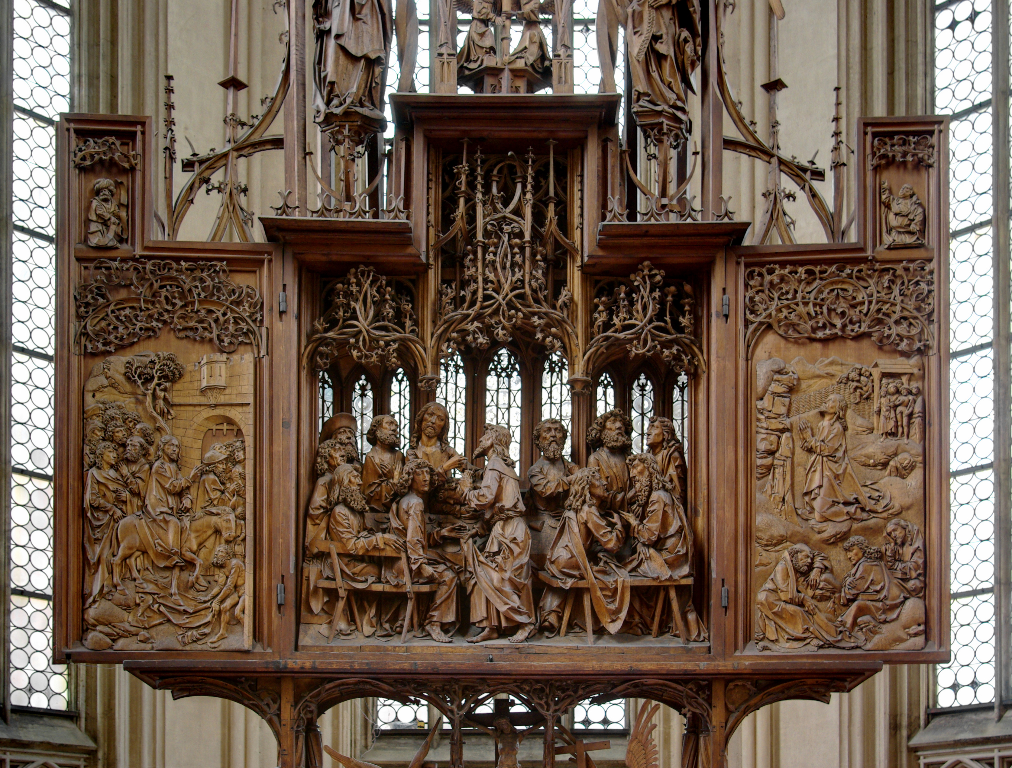 Rothenburg ob der Tauber, Heilig-Blut-Altar von Tilmann Riemenschneider in der St. Jakobs Kirche